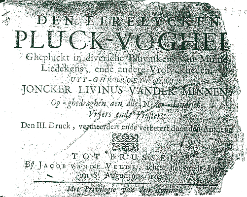 Derde editie van Den eerelycken pluck-voghel, Gepluckt in diversche Pluymkens, uitgegeven in Brussel. De eerste Brusselse editie is van 1669.